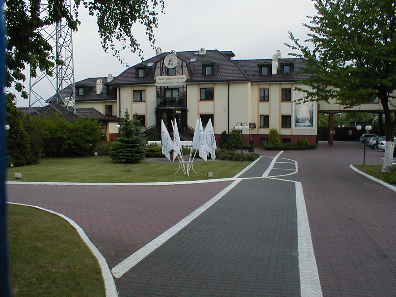 Sídlo Radia Maryja v Toruni, ulice Żwirki i Wigury.